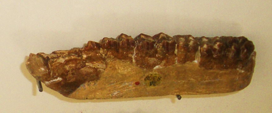 Fossil of Saghatherium, an extinct mammal -- Took the photo at Natural History Museum, London